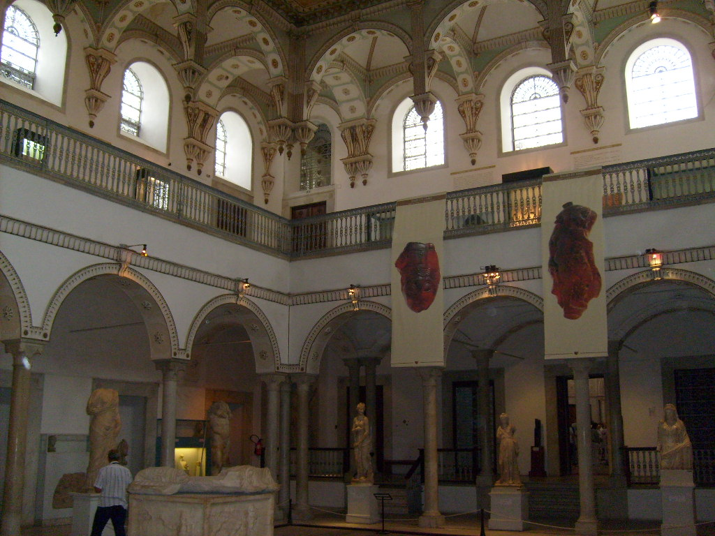 Salle de Carthage au Musée national du Bardo (Tunisie)